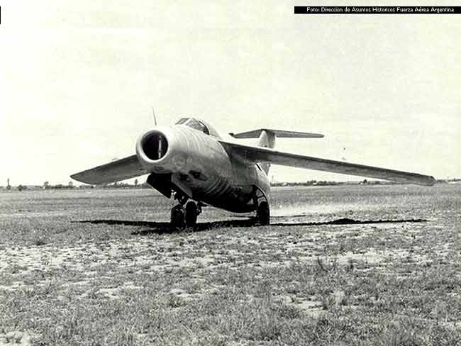 I.Ae. 33 Pulqui II